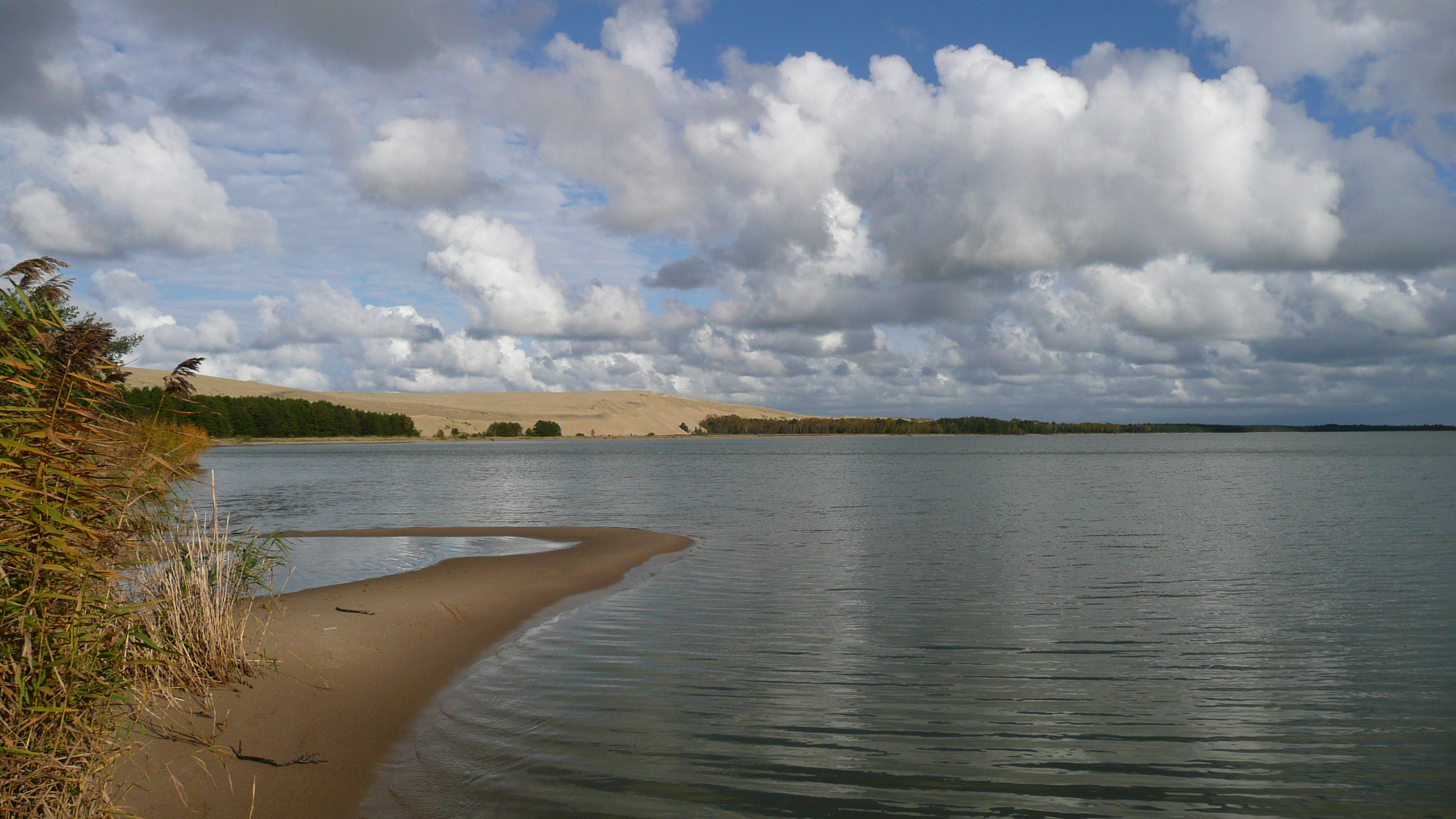 Вид на косу и залив от озера Лебедь